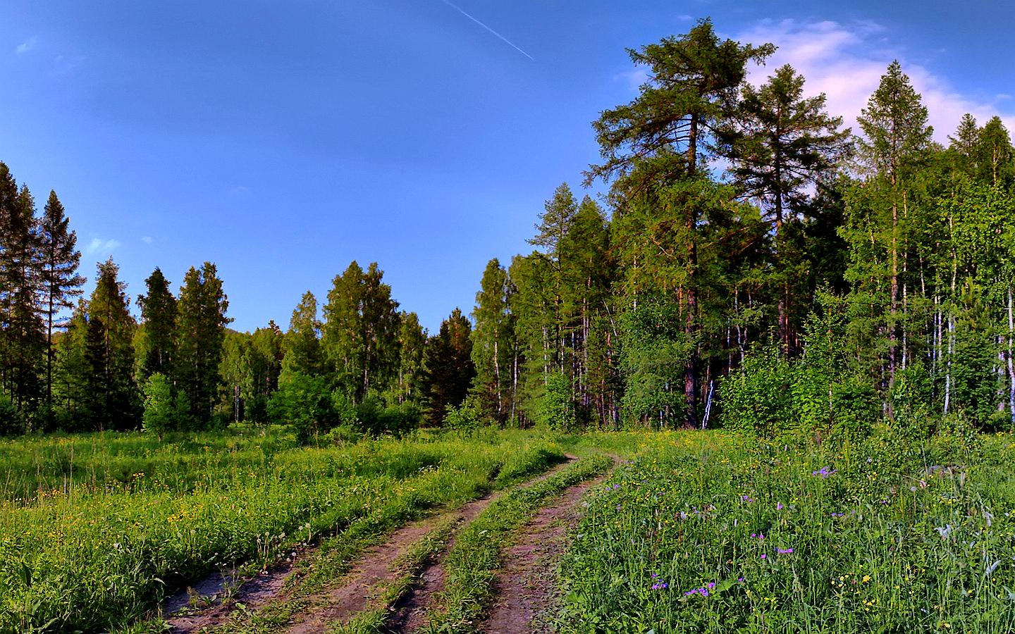 Природа вокруг Сатки - лесная дорога